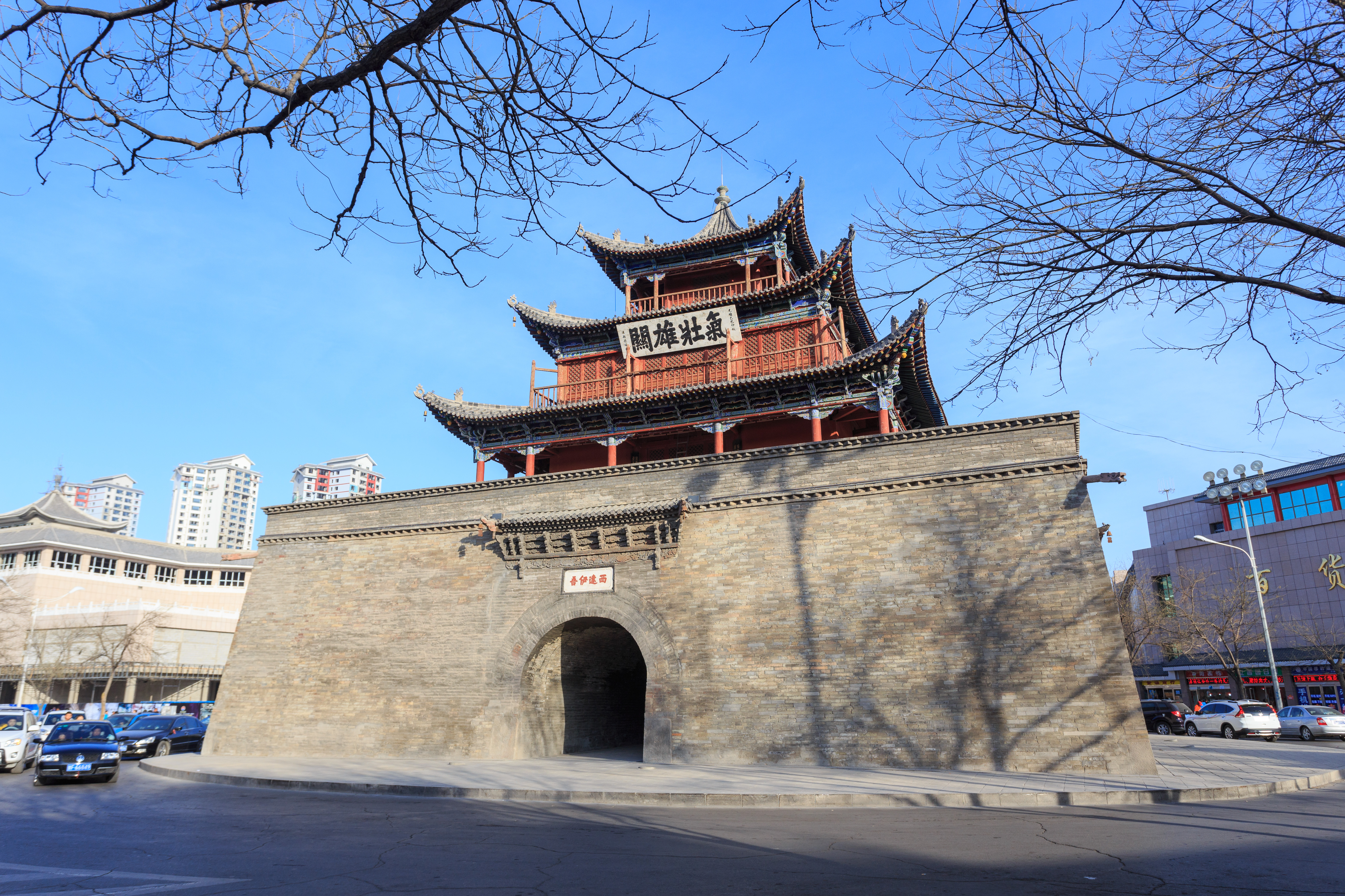 酒泉鼓楼西面